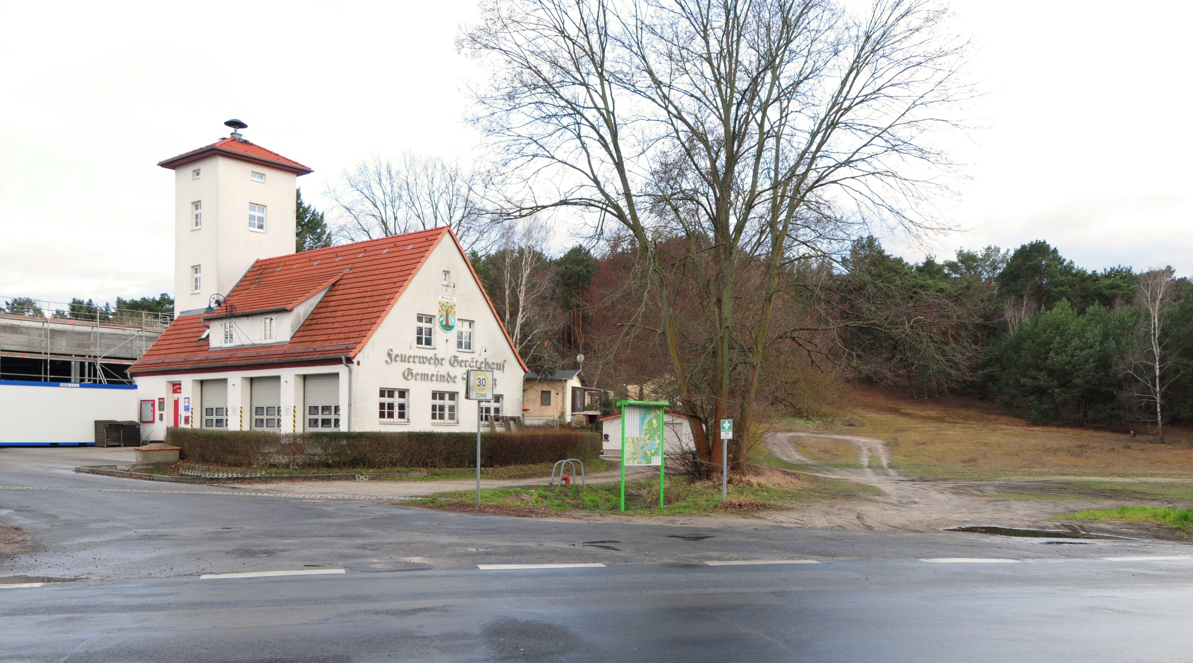 Senzig (Ortsteil von Königs Wusterhausen), Feuerwehrgebäude am Bullenberg